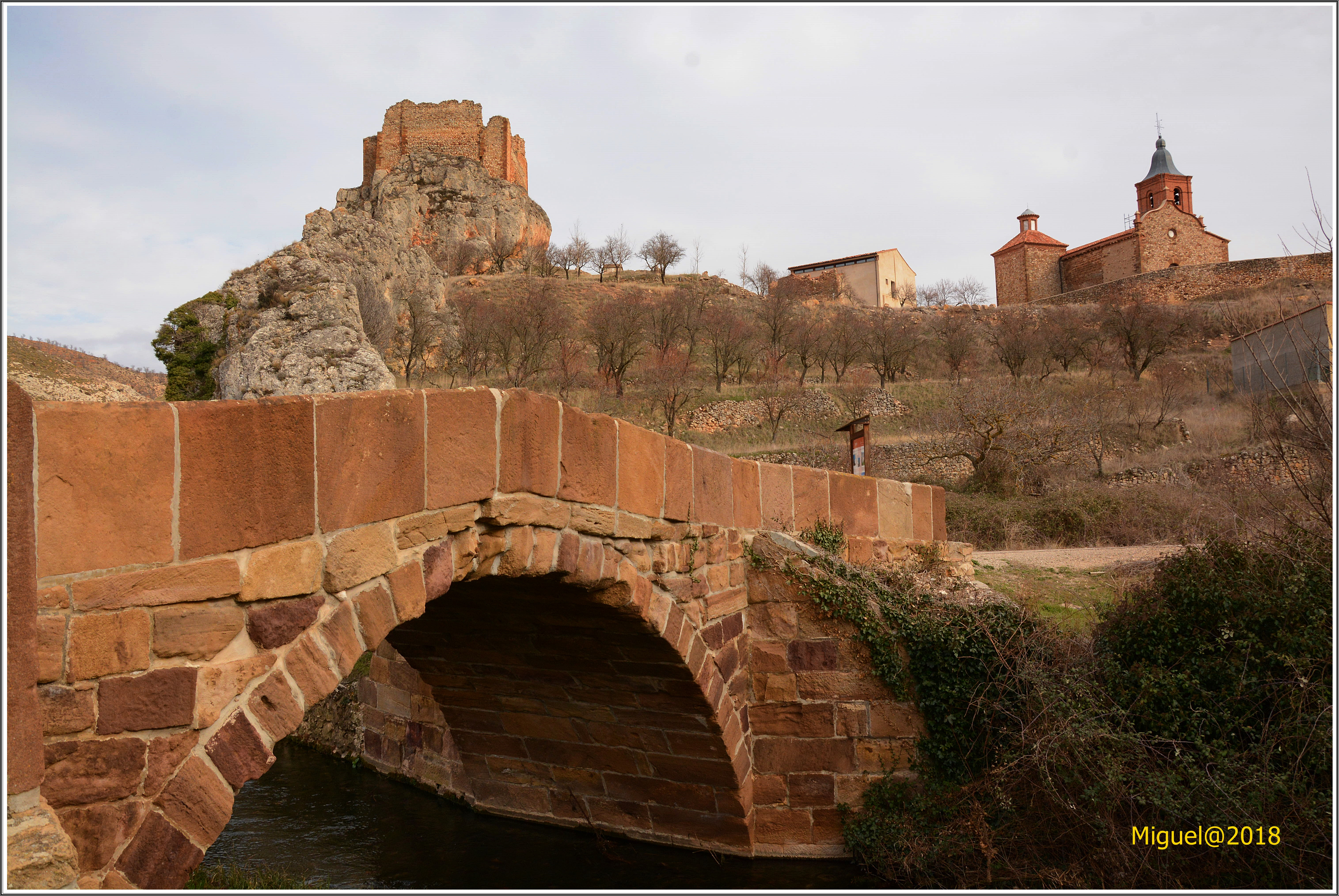 Berdejo. Zaragoza.